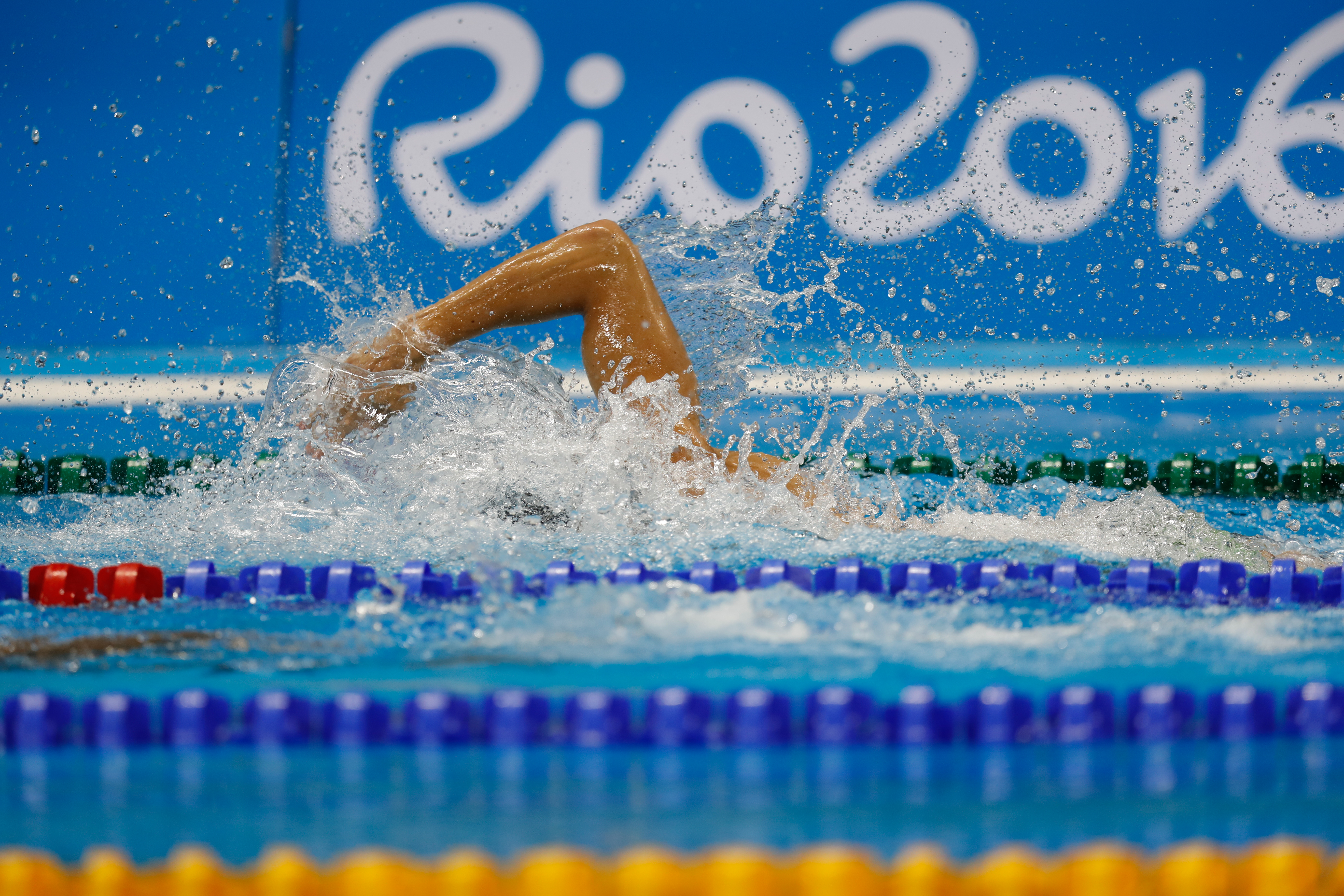 Rio de Janeiro - Atletas da natação treinam na piscina do Estádio Aquático, no Parque Olímpico da Barra da Tijuca (Fernando Frazão/Agência Brasil)